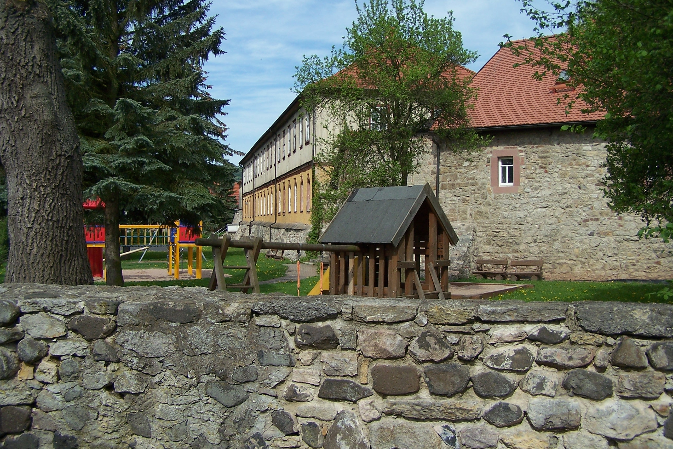 Blick von Süden in den Bereich des ehemaligen Burggrabens der Merlinsburg